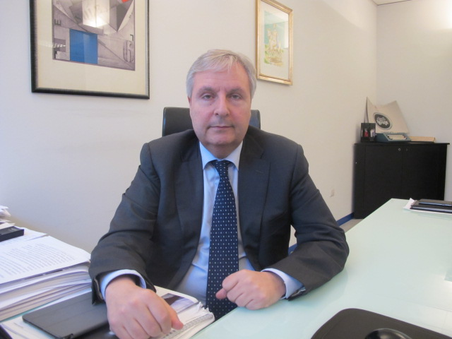 Roberto Iadicicco, direttore responsabile dell'Agi Agenzia Giornalistica Italia